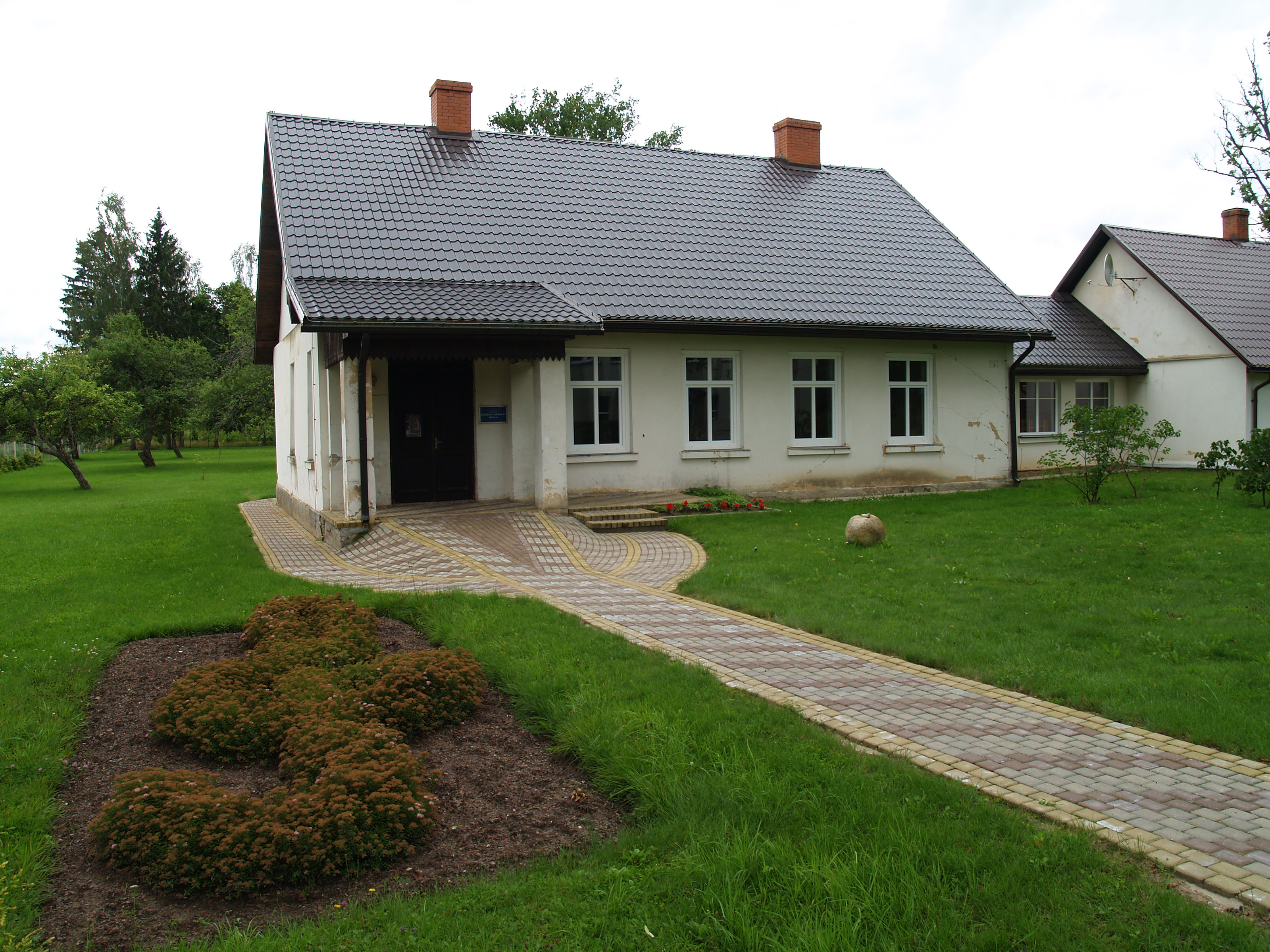 Aloja muusika- ja kunstikool